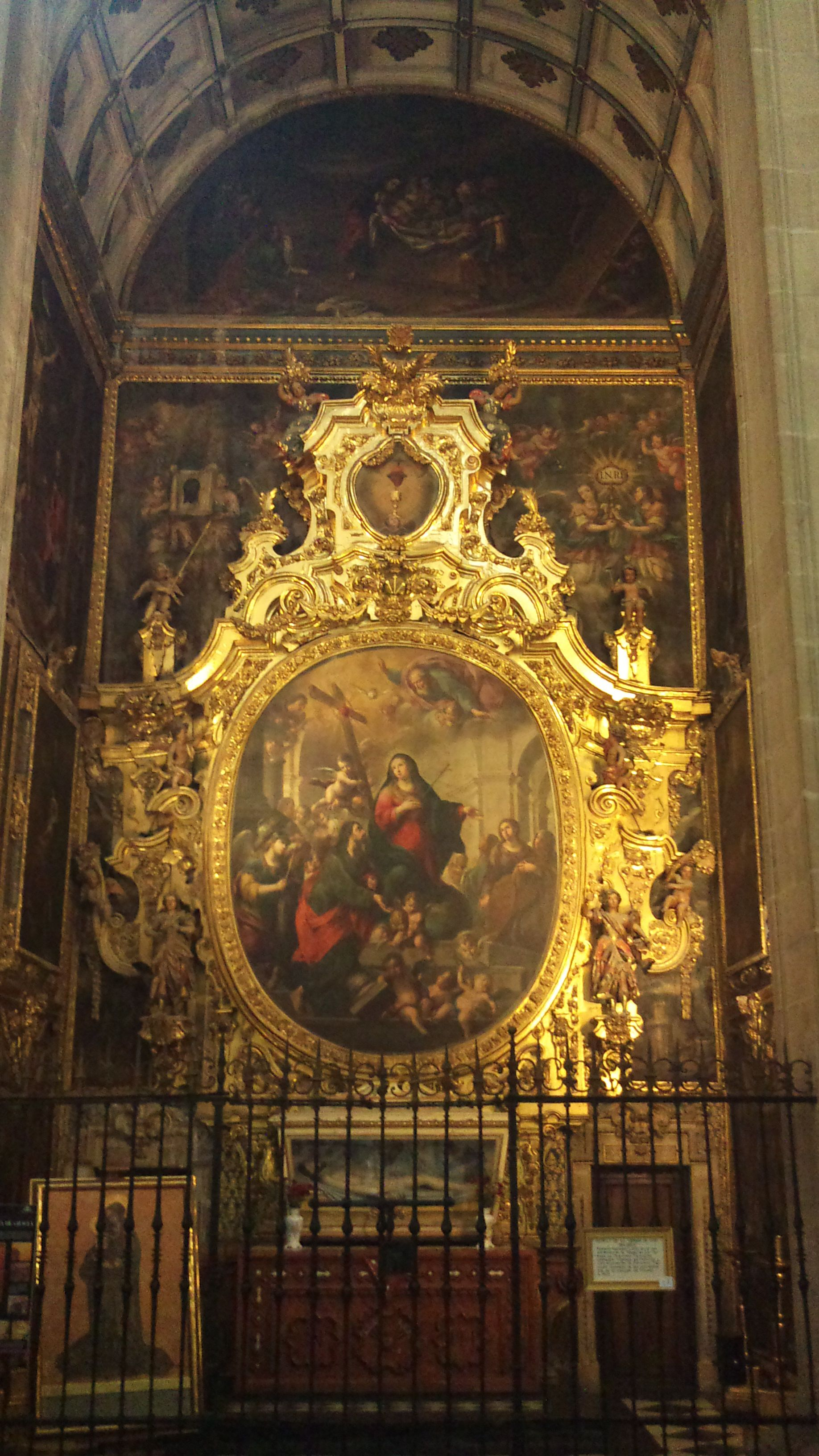 Capilla de la Virgen de los Dolores y Santo Sepulcro en la Catedral de Jaén.